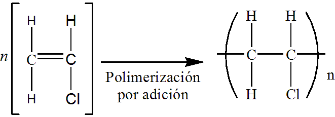 Reacción de polimerización del PVC